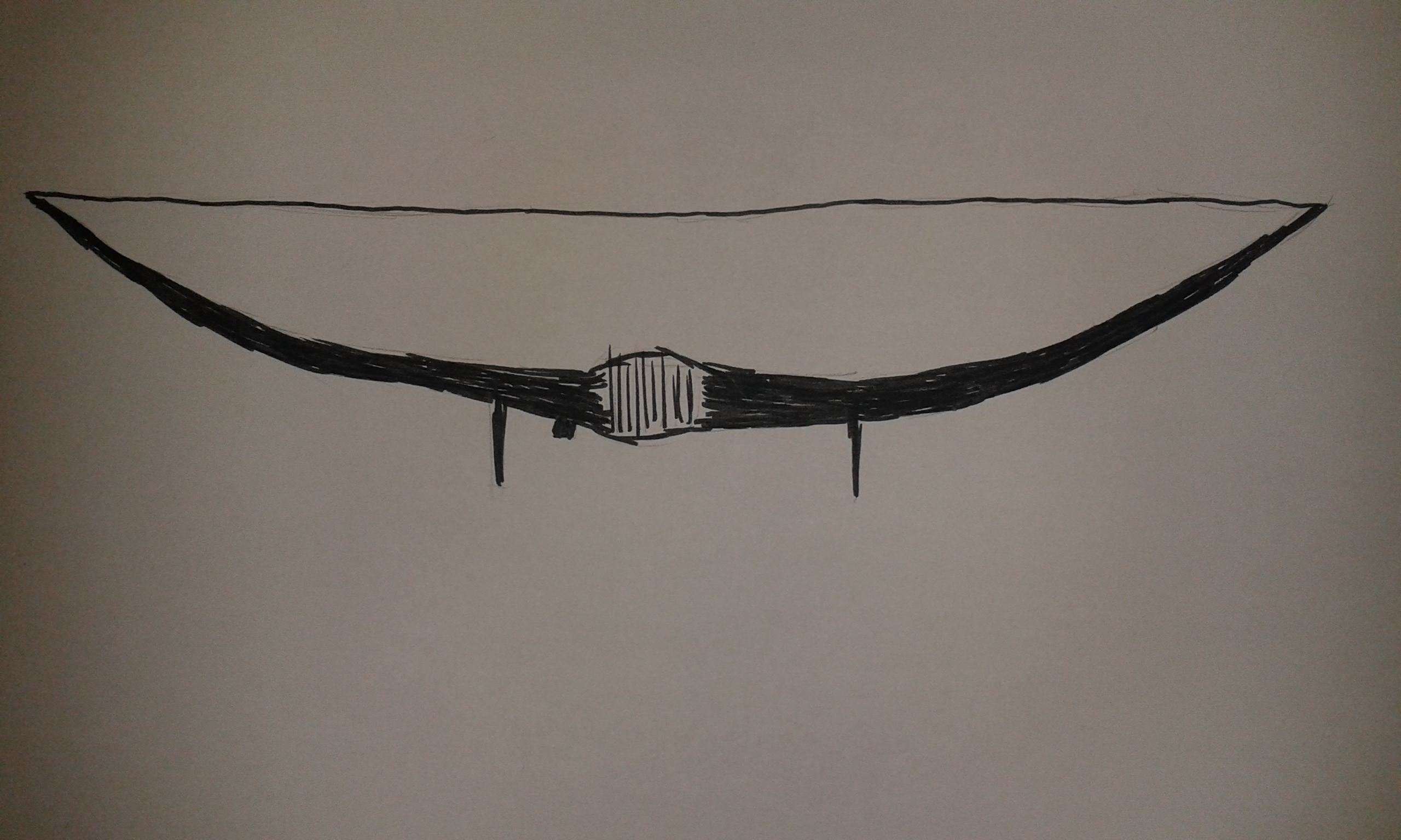 Hawkeyeův luk - boční pohled